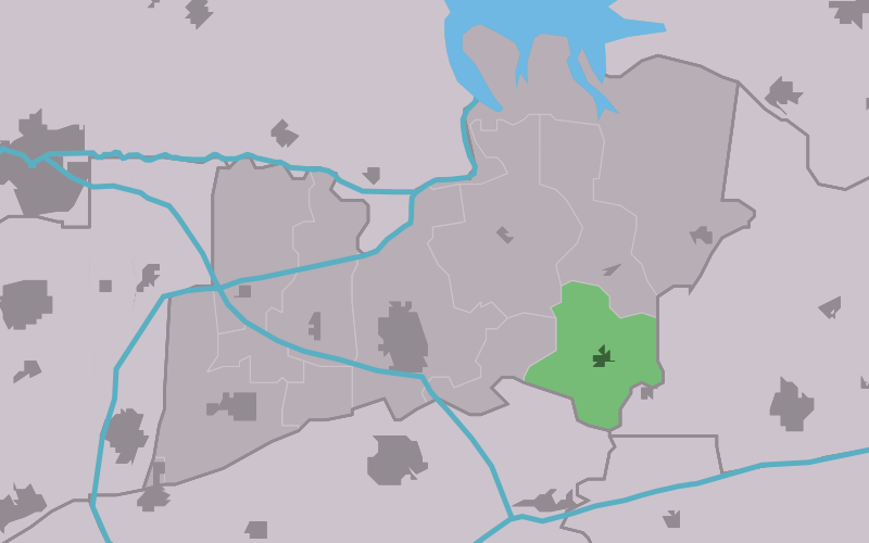 Kaartsje fan himrik fan Boerum